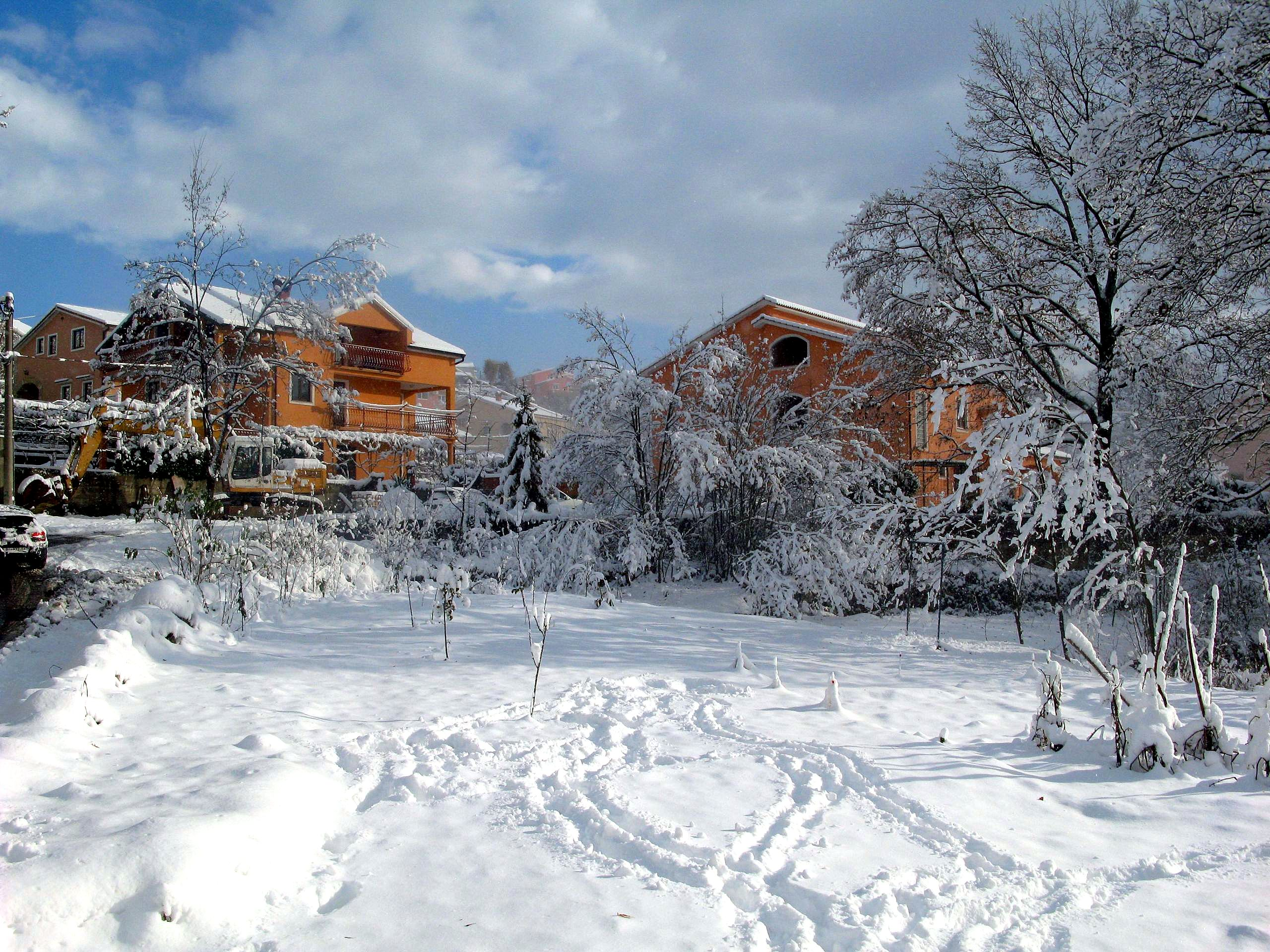 Snow, Viškovo